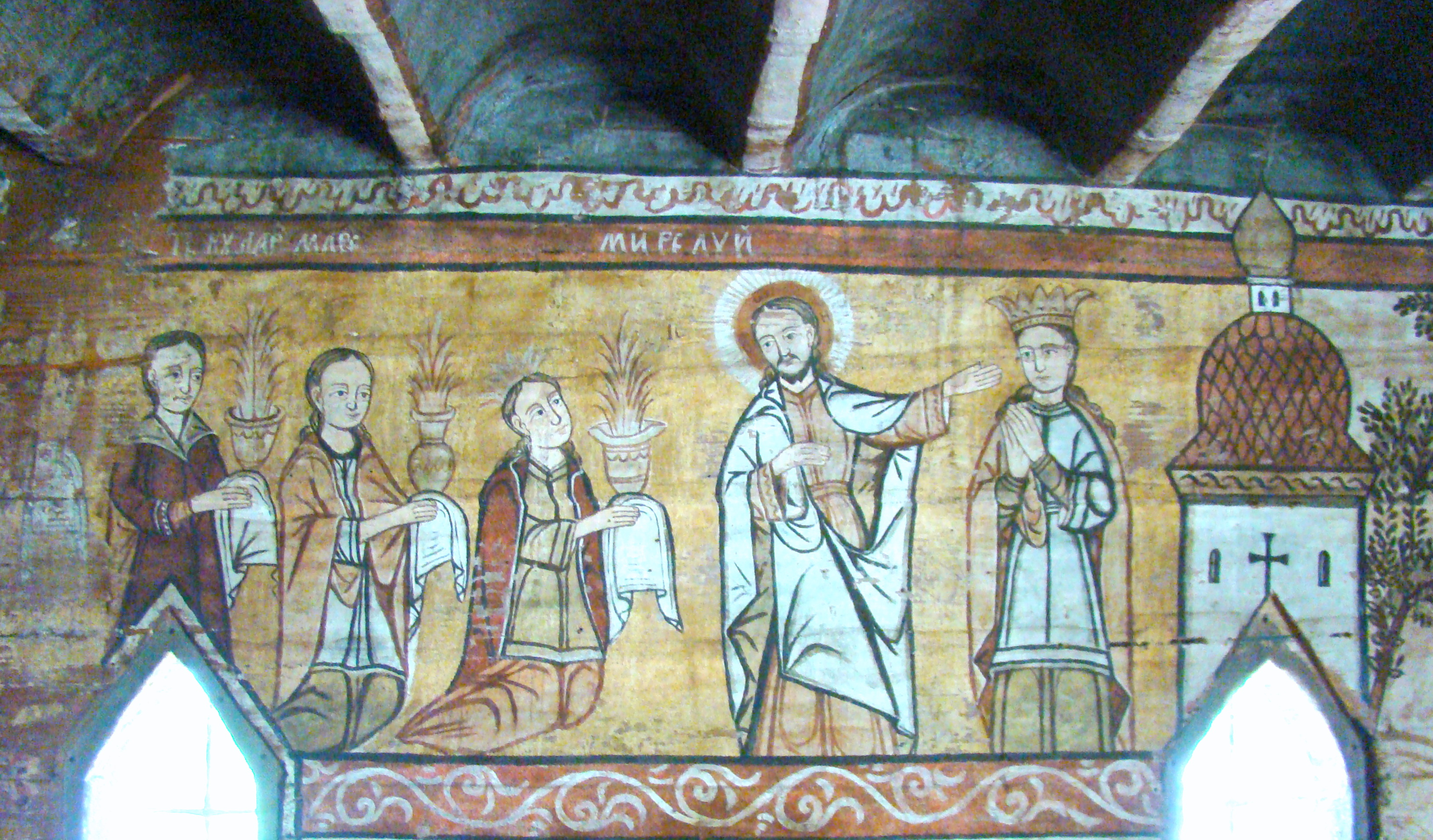 Biserica de lemn "Naşterea Maicii Domnului", sat IEUD